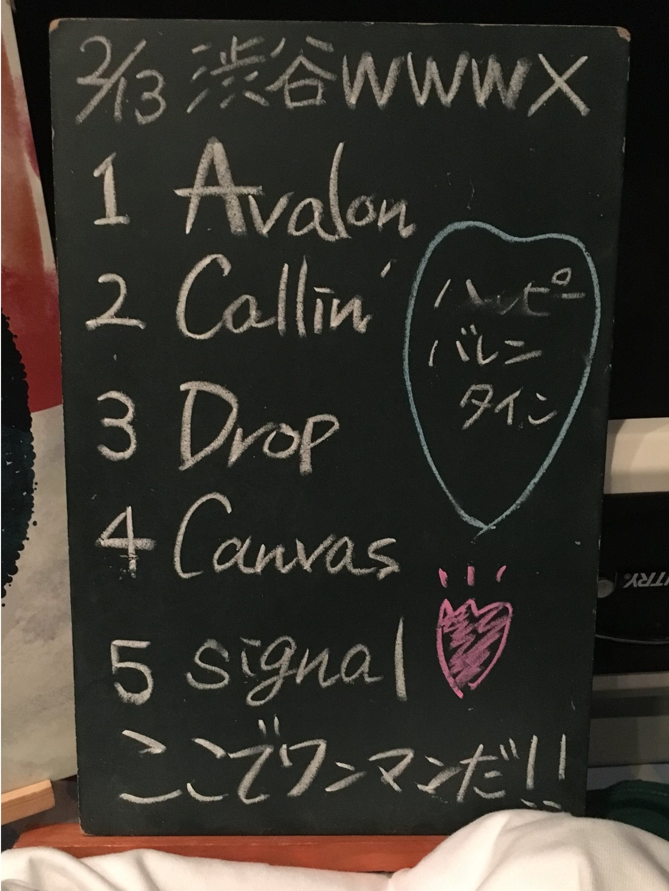 amiinAセトリボード(20180213(1))